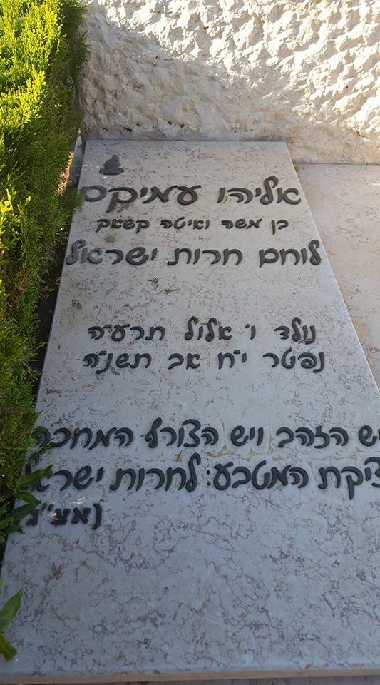 קבר העיתונאי אליהו עמיקם בנחלת יצחק. צילום אלי אלון